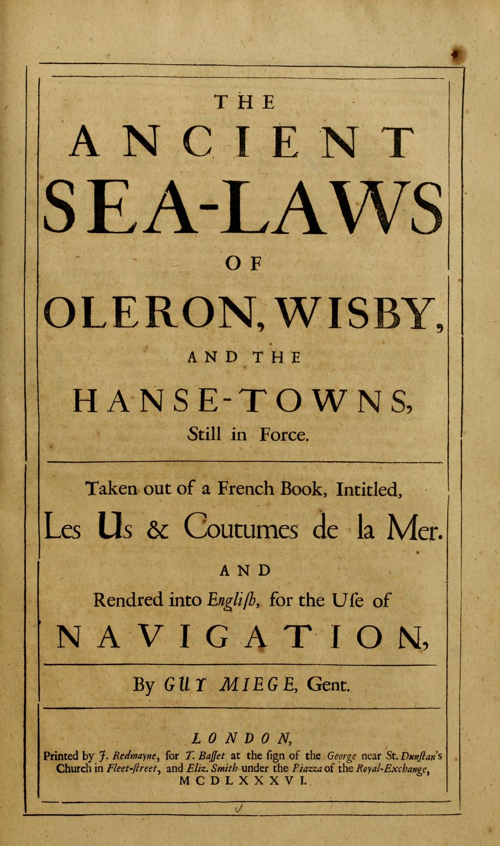 The Ancient Sea Laws of Oleron, Wisby, and the Hanse Towns (traduction de Guy Miège), published in Consuetudo, vel, Lex mercatoria or, The ancient law-merchant, in three parts, according to the essentials of traffick : necessary for statesmen, judges, magistrates, temporal and civil lawyers, mint-men, merchants, mariners, and all others negotiating in any parts of the world, by Gerard Malynes and alii, 1686